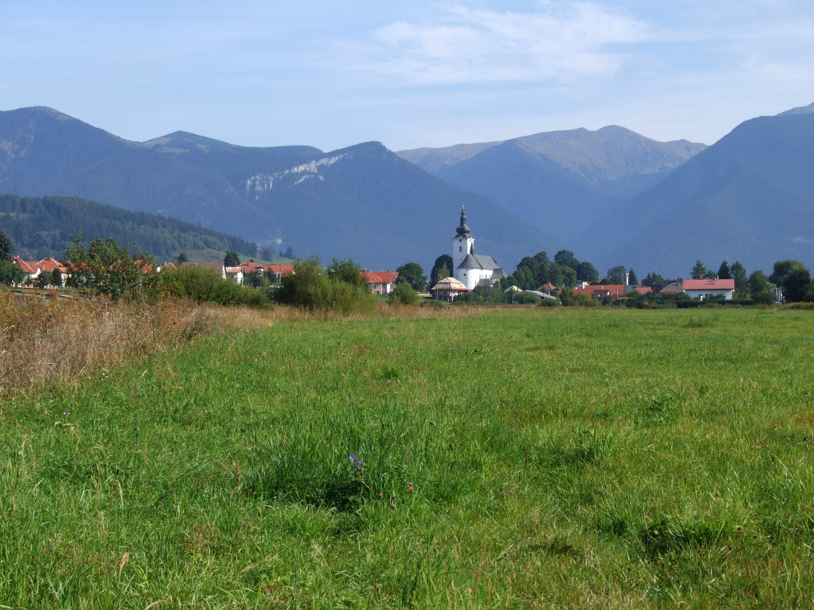 Bobrovec (obec). Miejscowość Bobrowiec na Słowacji